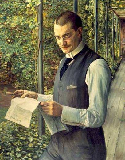 Franz Koenigs (1881-1941); Nederlands bankier en kunstverzamelaar geschilderd door zijn schoonvader